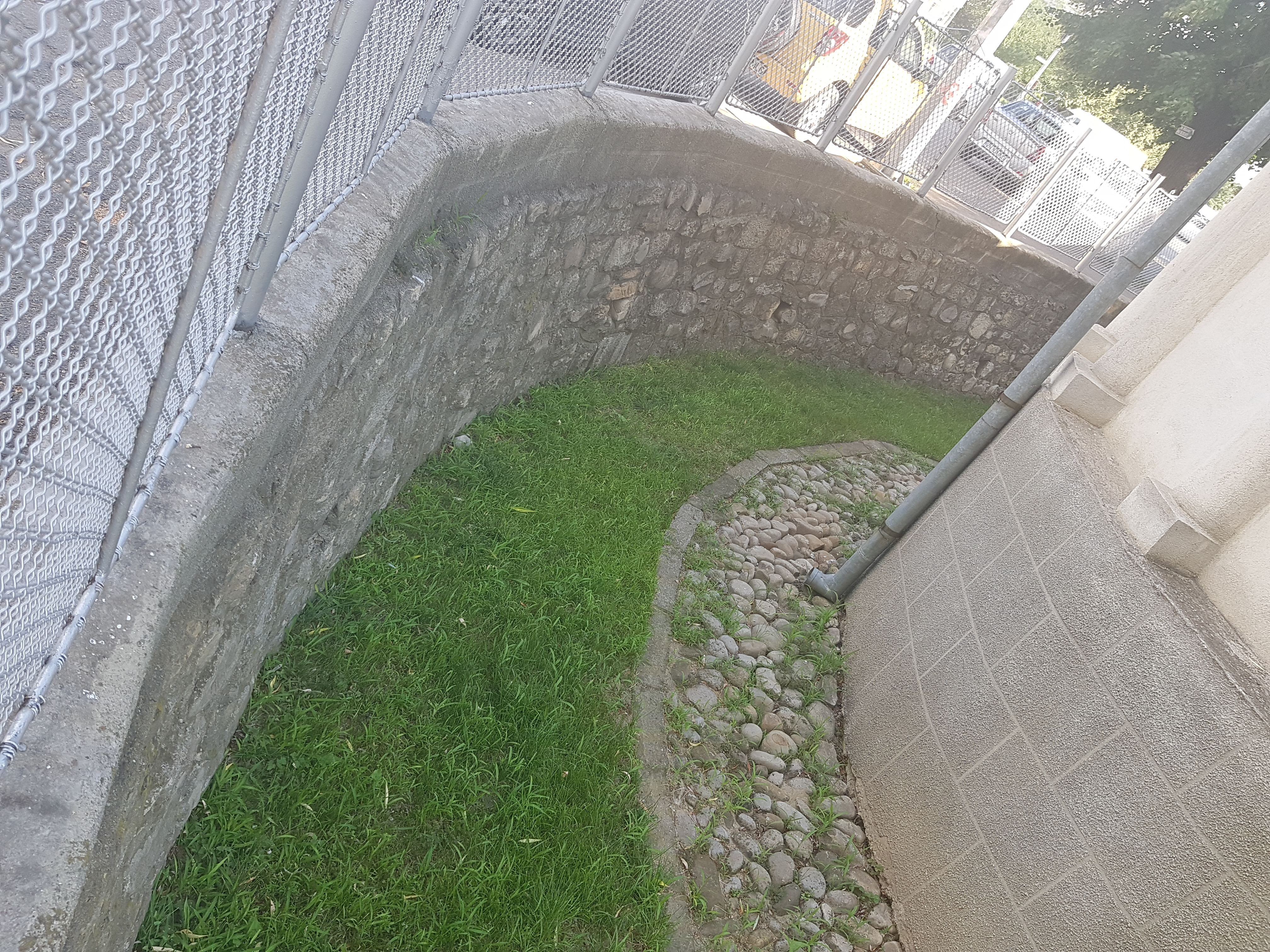 Zid de incintă 02